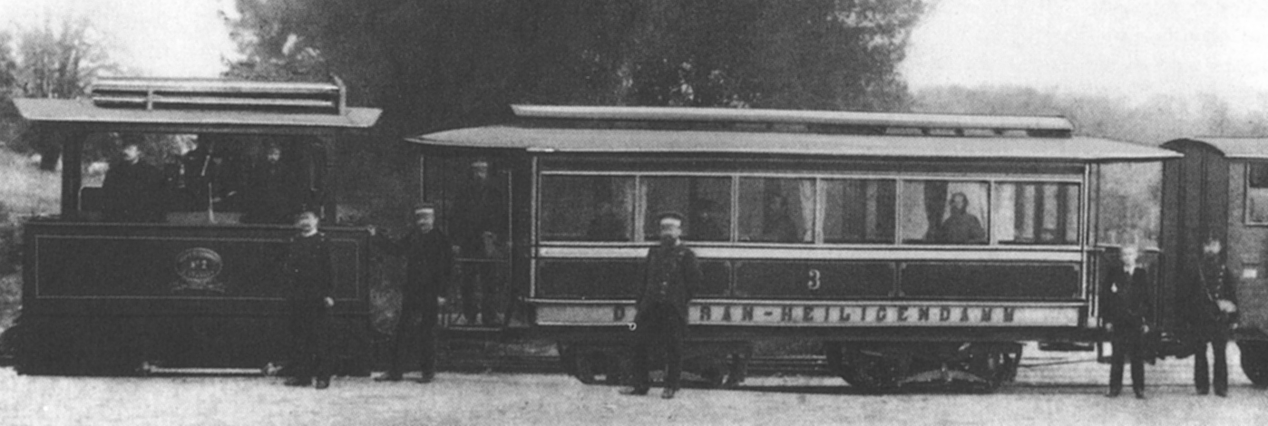 Dampflokomotive Mecklenburgische XVIII der Mecklenburgischen Bäderbahn Molli.